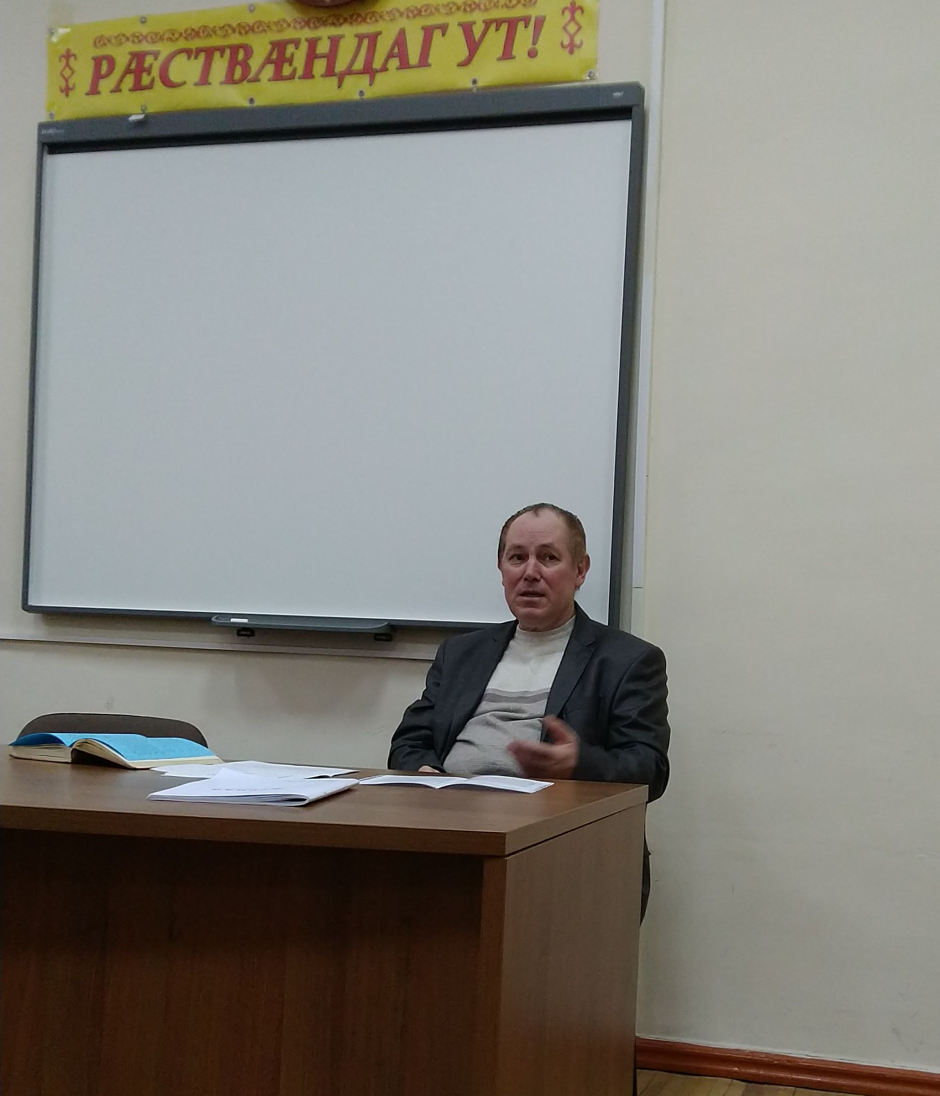 Эльбрус Батырбекович Сатцаев рассказывает об авестийском языке на первом Владикавказском фестивале языков в мемориальная аудитории 123 факультета осетинской филологии СОГУ.